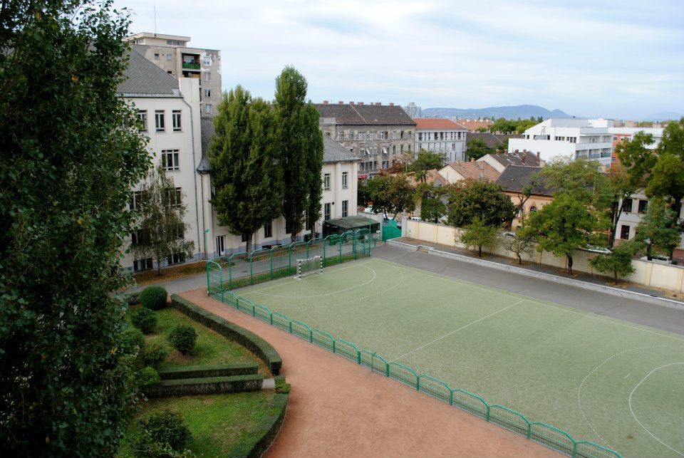 A budapesti Szent László Gimnázium udvara